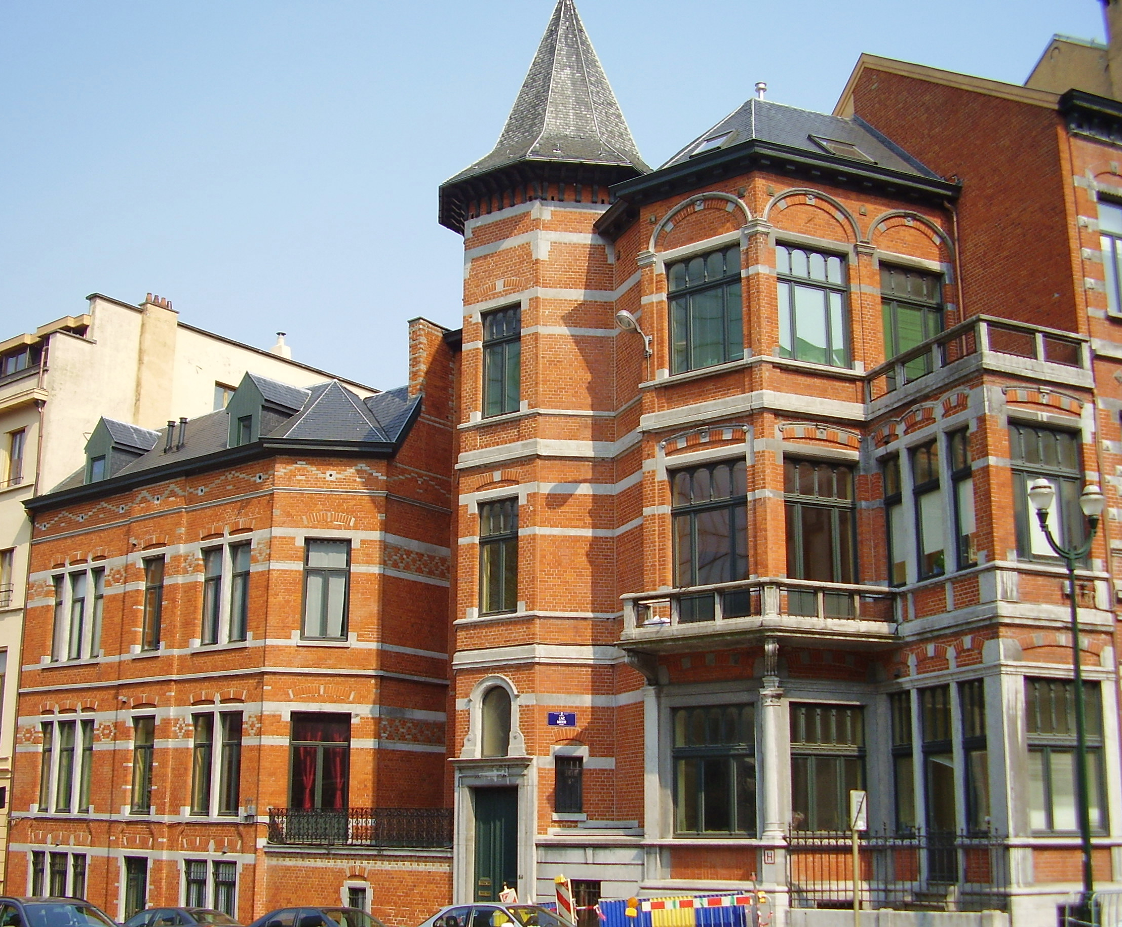 Art Nouveauhuis, gerealiseerd door Ernest Delune in 1906, Meerstraat 52-54, Brussel